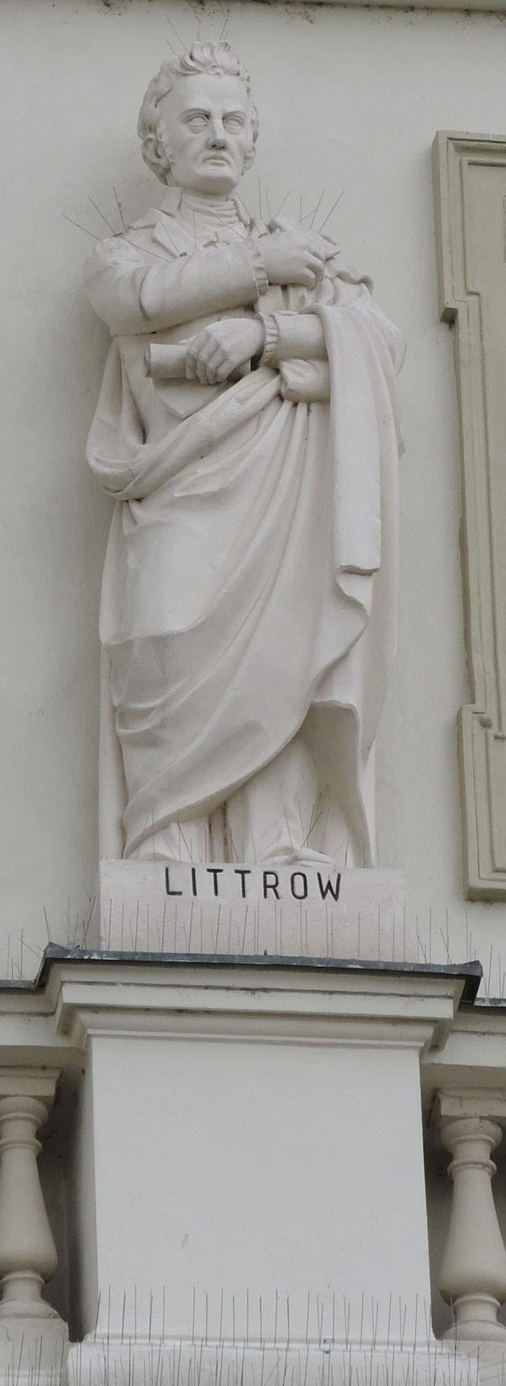 Justiční akademie, Masarykovo náměstí 183/15, Kroměříž. Josef Johann von Littrow - socha na průčelí budovy.